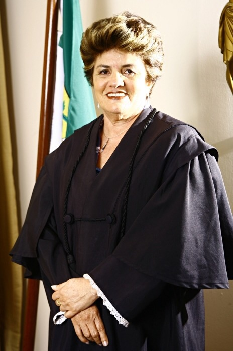 Desembargadora Judite de Miranda Monte Nunes